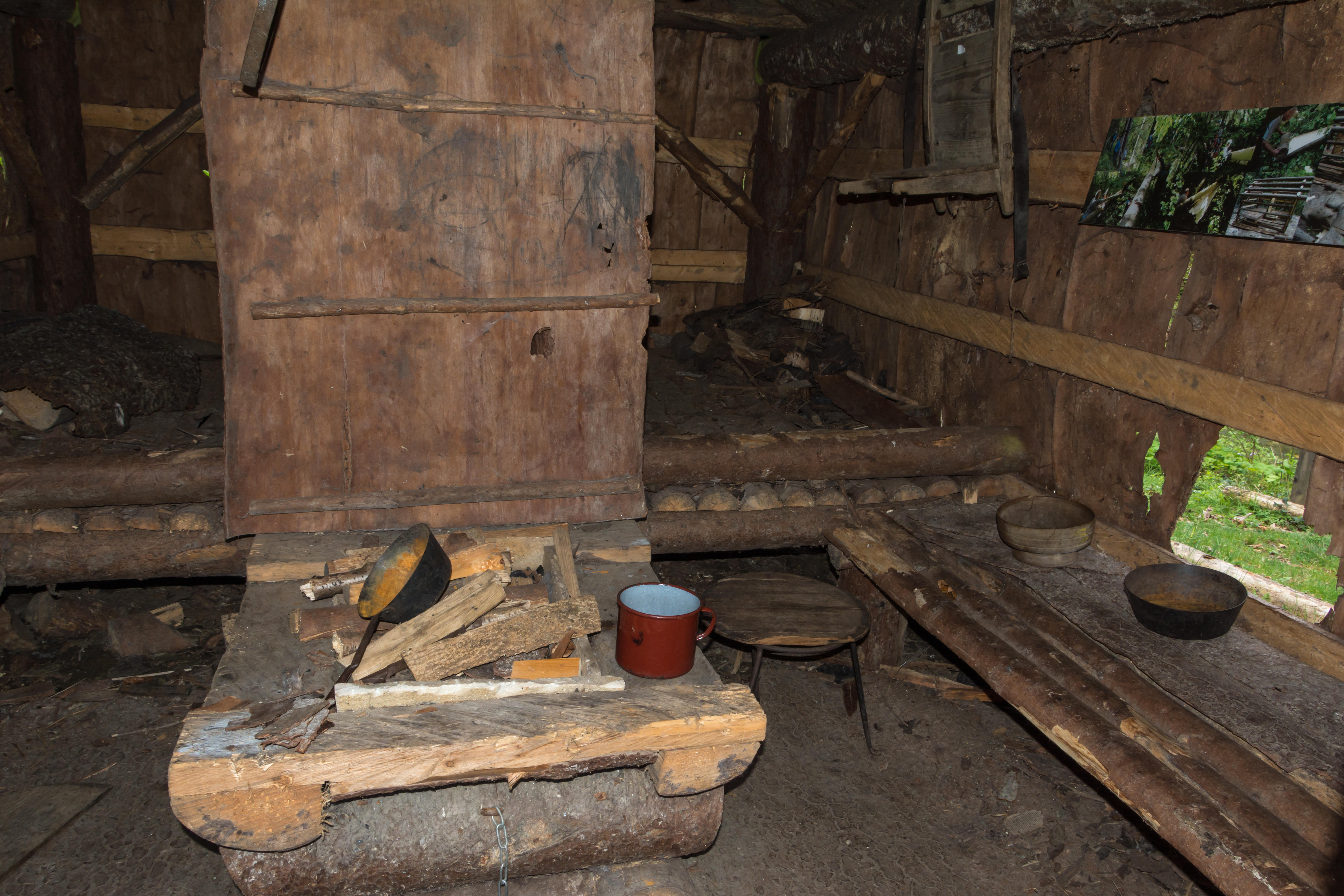 Innenraum der nachgebauten Holzknechthütte in der Donnersbacher Klamm This media shows the natural monument in Styria with the ID 966.